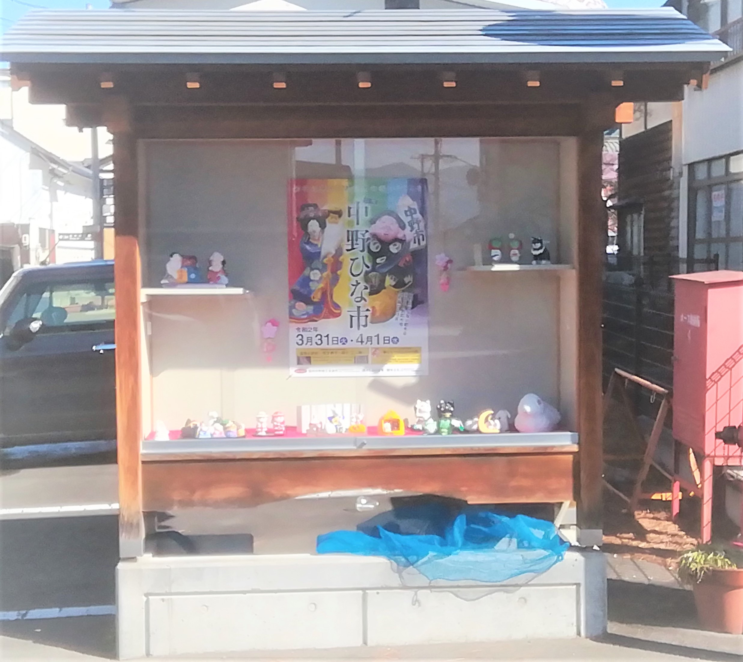 創作土人形工房 まちなか交流の家（2020-2-21）